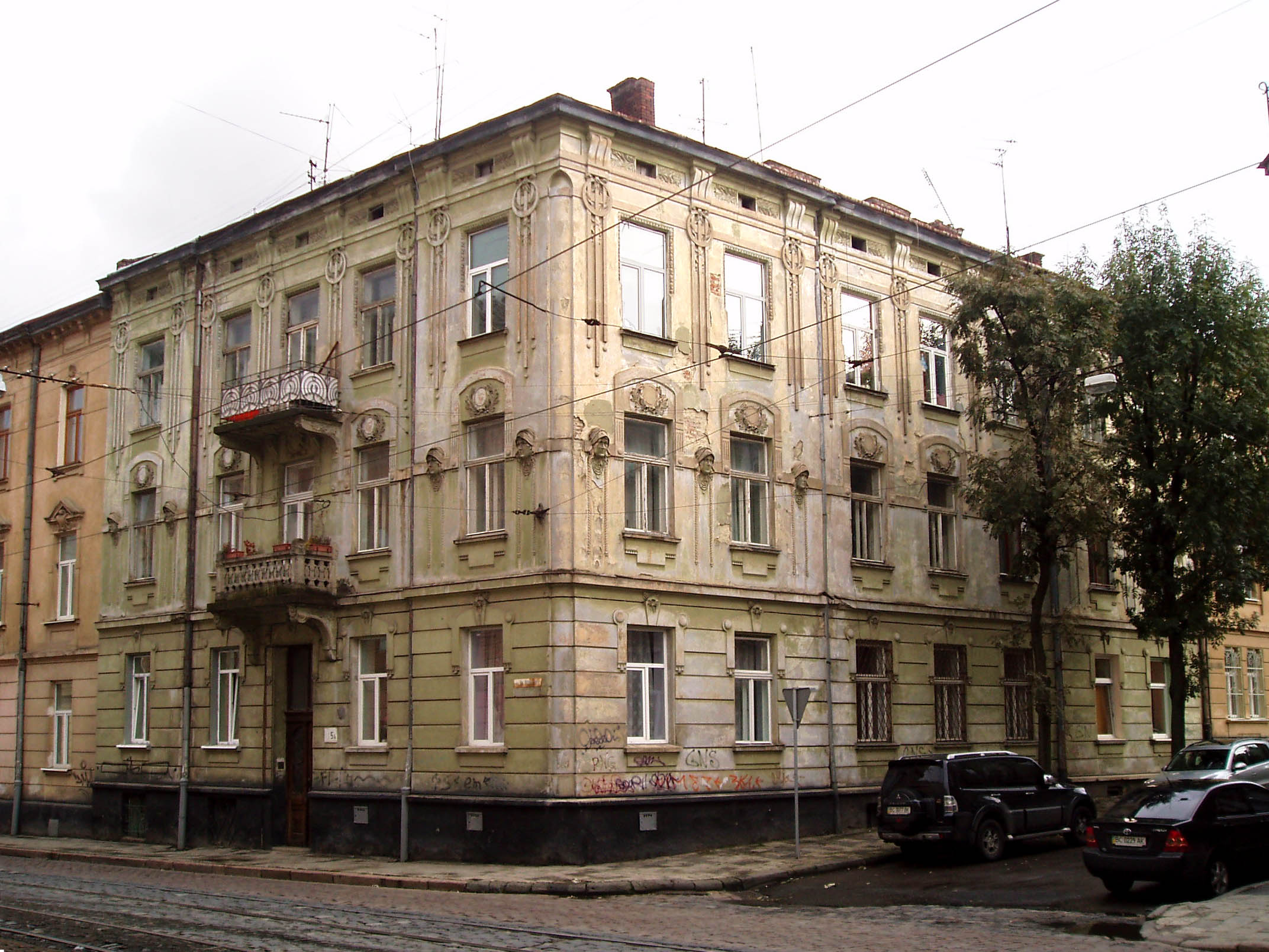 Дім на вулиці Вітовського, 5а у Львові. Архітектор Каспар Юліан Драневич.